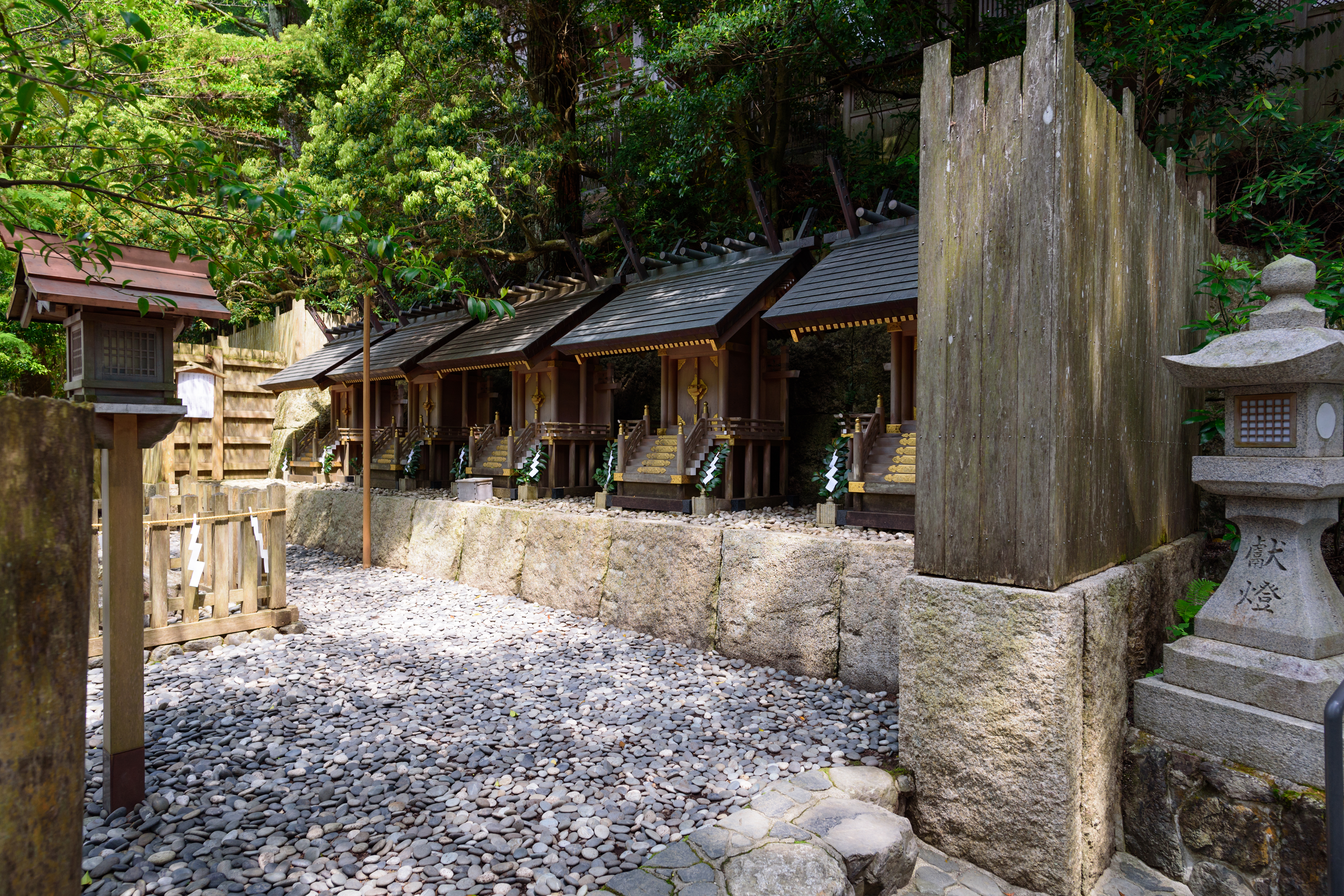 天河大辯財天社五社殿